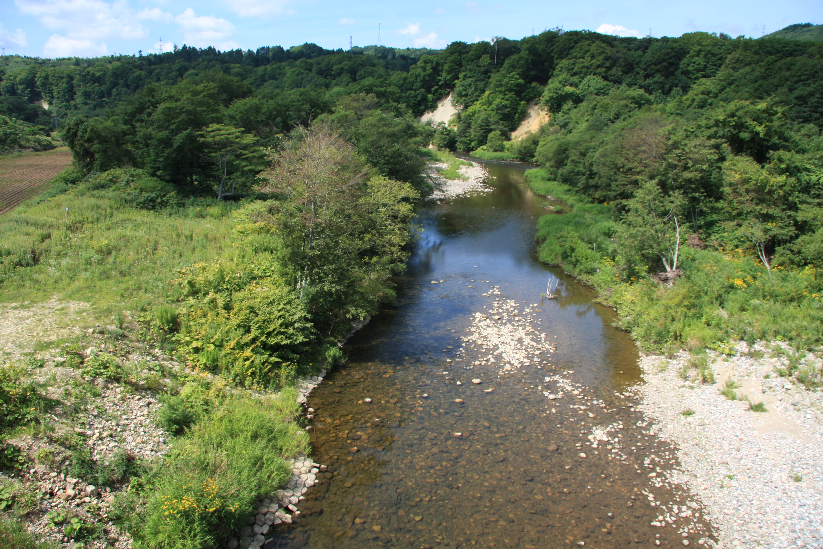 後志利別川 メノウ橋より下流を望む